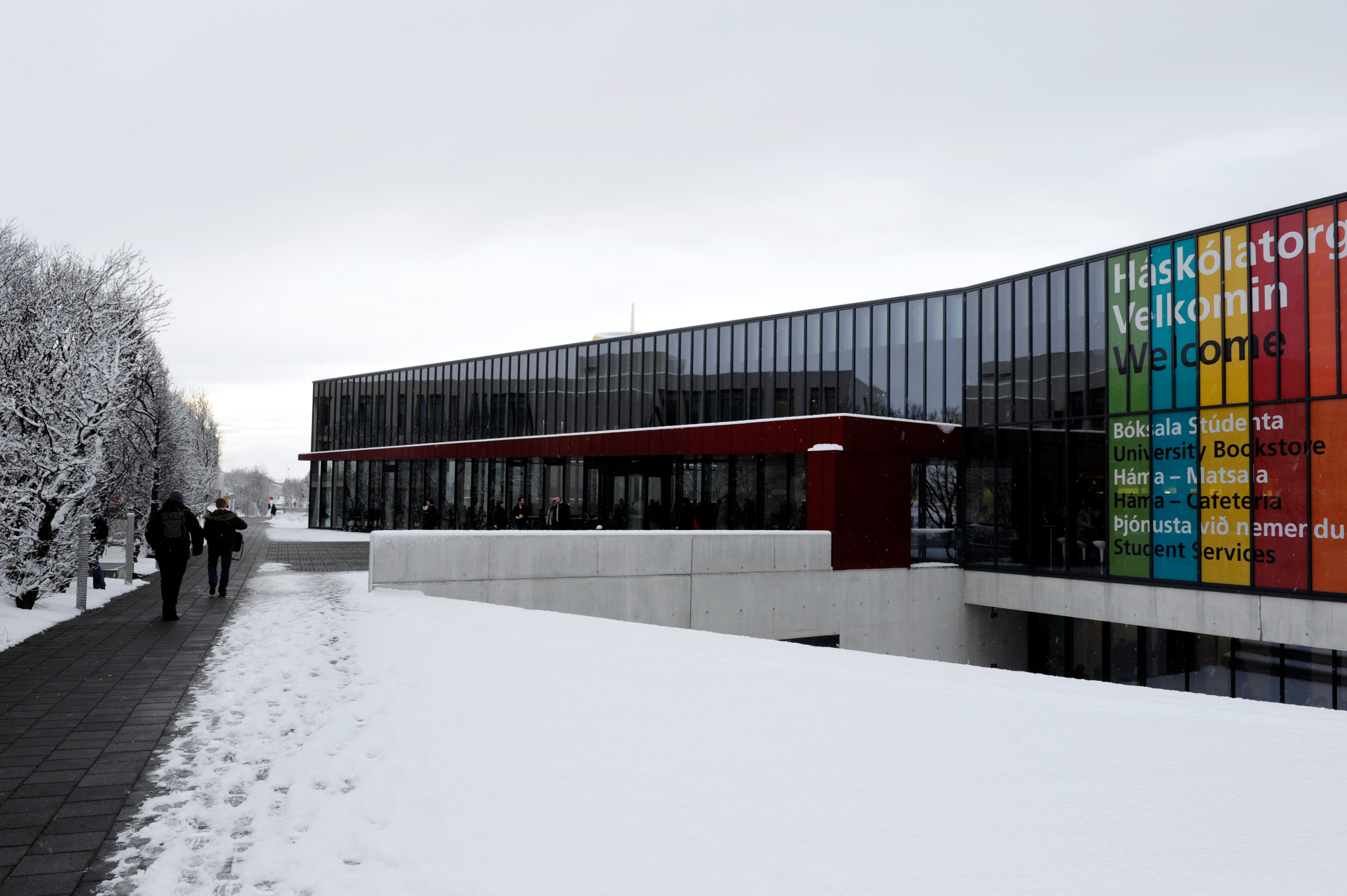 Islands universitet 2009-01-28